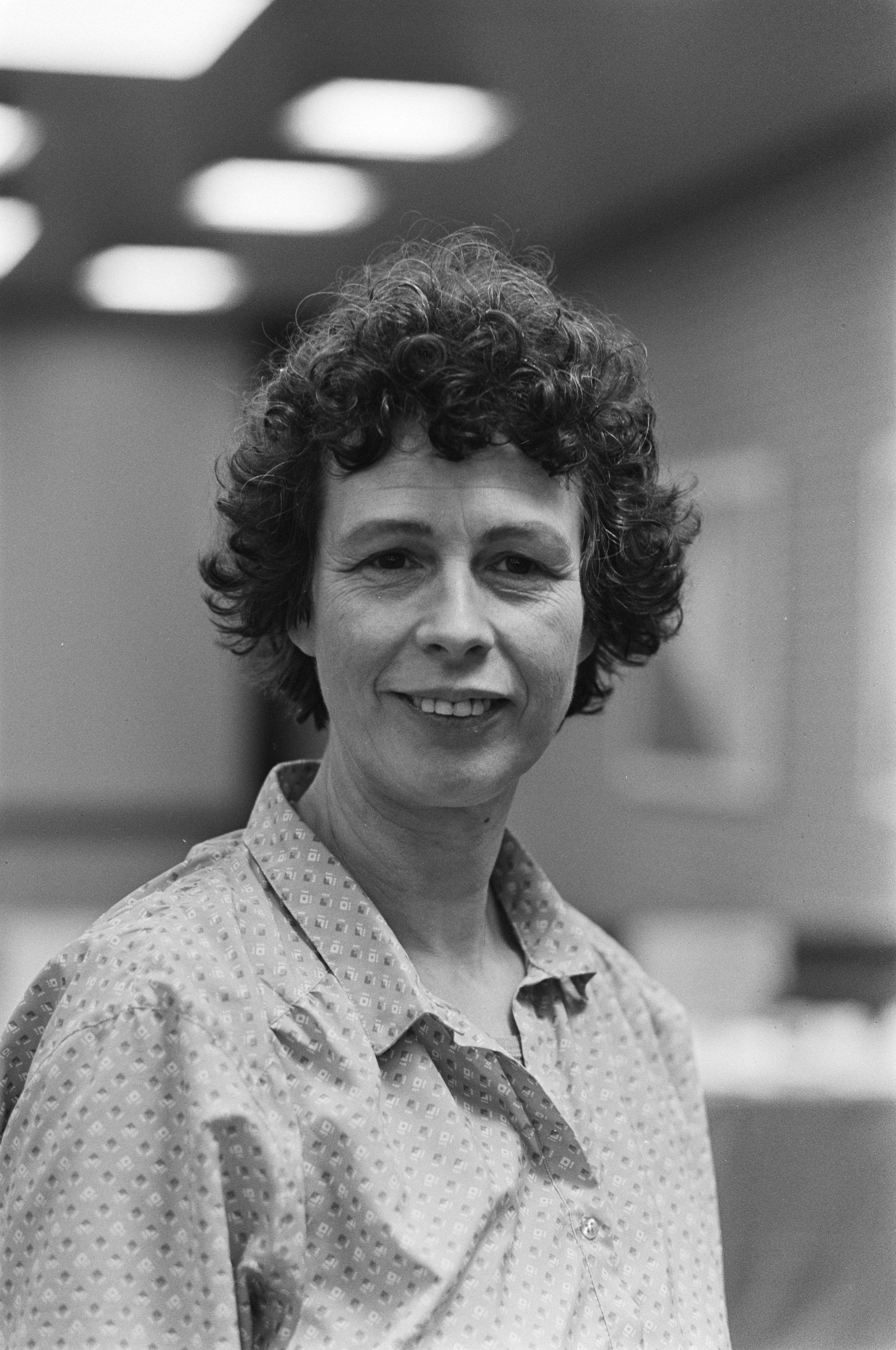 Collectie / Archief : Fotocollectie Anefo Reportage / Serie : [ onbekend ] Beschrijving : Bijeenkomst Rooie Vrouwen in Utrecht i.v.m. de Wet op d Seksediscriminatie; Pijkel Schroder Datum : 8 maart 1980 Locatie : Utrecht Trefwoorden : DISCRIMINATIE, Vrouwen, bijeenkomsten, voorzitters Persoonsnaam : Schröder, Pijkel Fotograaf : Suyk, Koen / Anefo Auteursrechthebbende : Nationaal Archief Materiaalsoort : Negatief (zwart/wit) Nummer archiefinventaris : bekijk toegang 2.24.01.05 Bestanddeelnummer : 930-7117